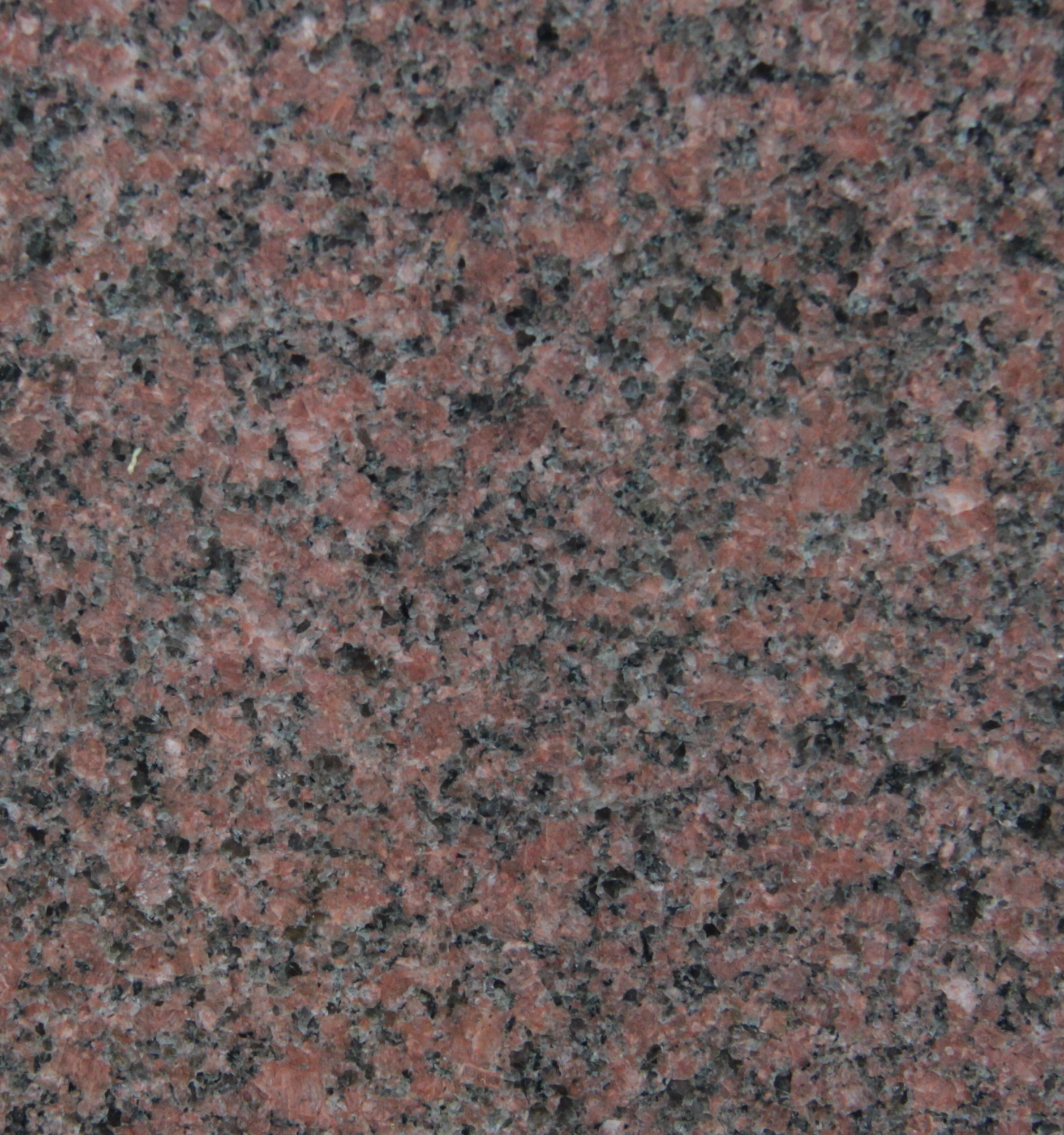 feinkörniger Typ Balmoral Fein (englisch: Fine Grained)